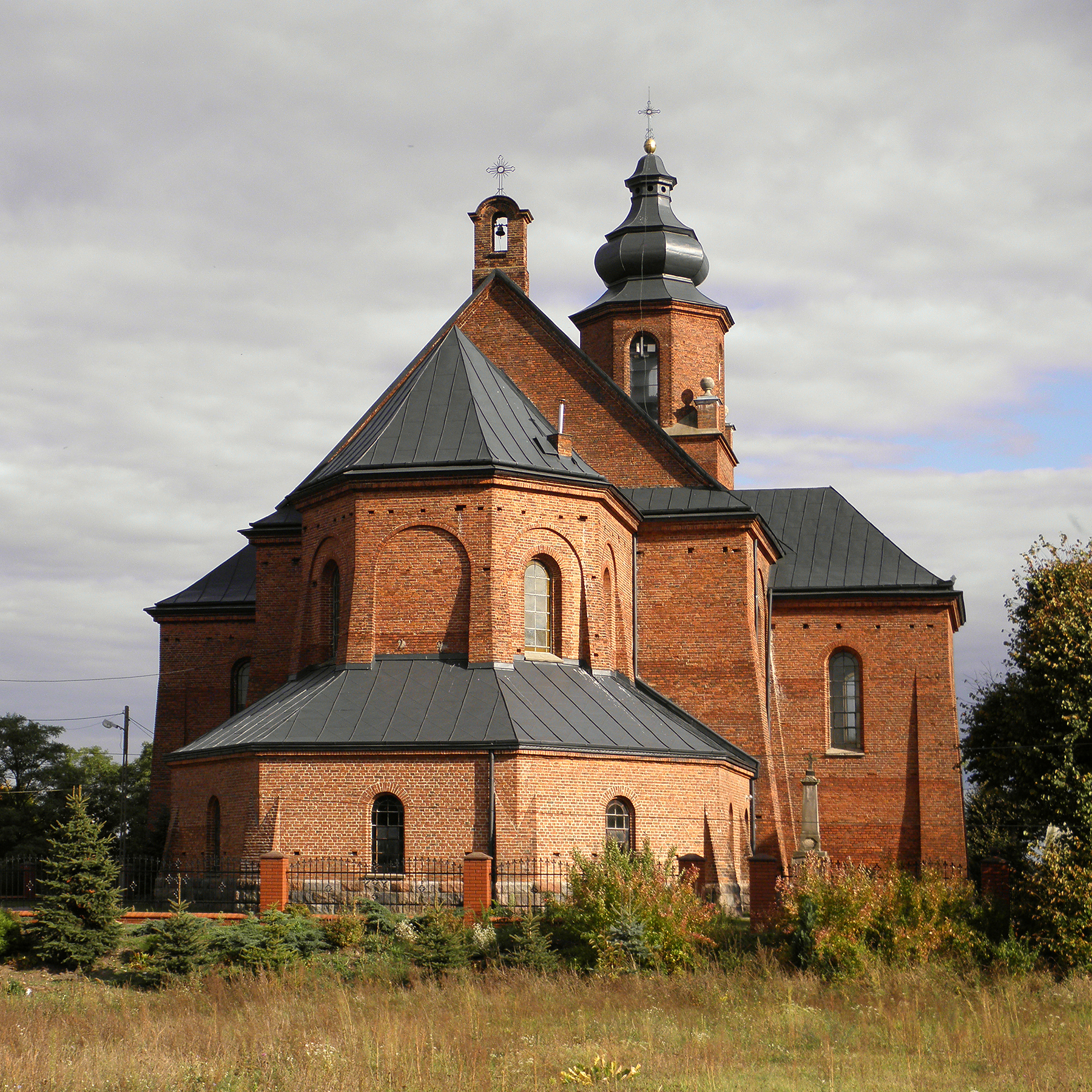 Ciepielów - kościół p.w. Podwyższenia Krzyża Świętego (zabytek nr 338/A z 10.04.1986)